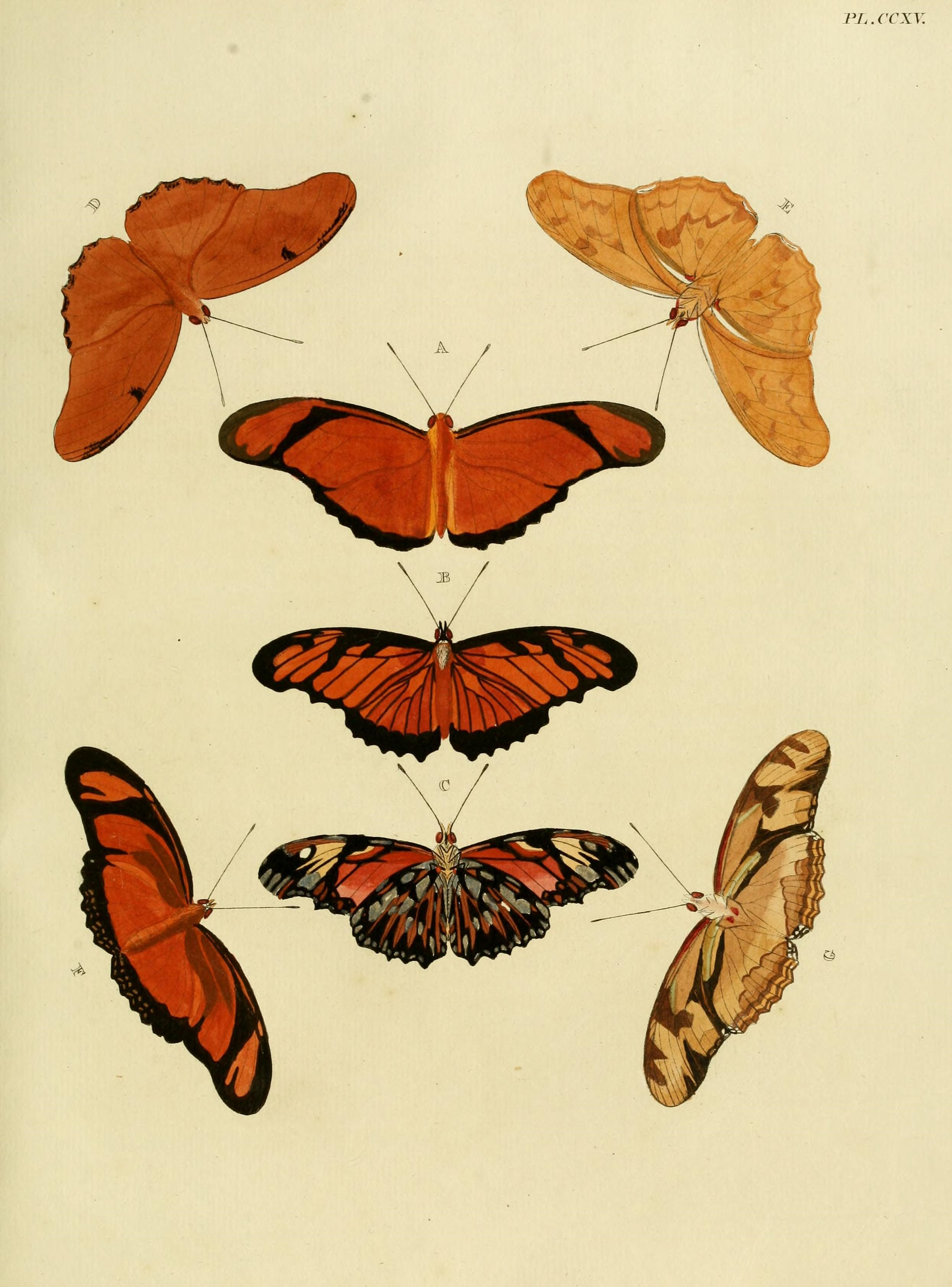 Plate CCXV A (♂), F, G (♀): "(Papilio) Alcionea" ( = Dryas iulia alcionea (Cramer, 1779), iconotype ssp.?), see Funet. B, C: "(Papilio) Juno"( = Dione juno (Cramer, [1779], iconotype?), see Funet. Photos at Tree of Life. D, E: "(Papilio) Cillene" ( = Dryas iulia delila (Fabricius, 1775)), see Funet. Photos at Butterflies of America F, G: "(Papilio) Alcionea" , see fig. A. Plate CCXV A (♂), F, G (♀): "(Papilio) Alcionea" ( = Dryas iulia alcionea (Cramer, 1779), iconotype ssp.?), see Funet. B, C: "(Papilio) Juno"( = Dione juno (Cramer, [1779], iconotype?), see Funet. Photos at Tree of Life. D, E: "(Papilio) Cillene" ( = Dryas iulia delila (Fabricius, 1775)), see Funet. Photos at Butterflies of America F, G: "(Papilio) Alcionea" , see fig. A.